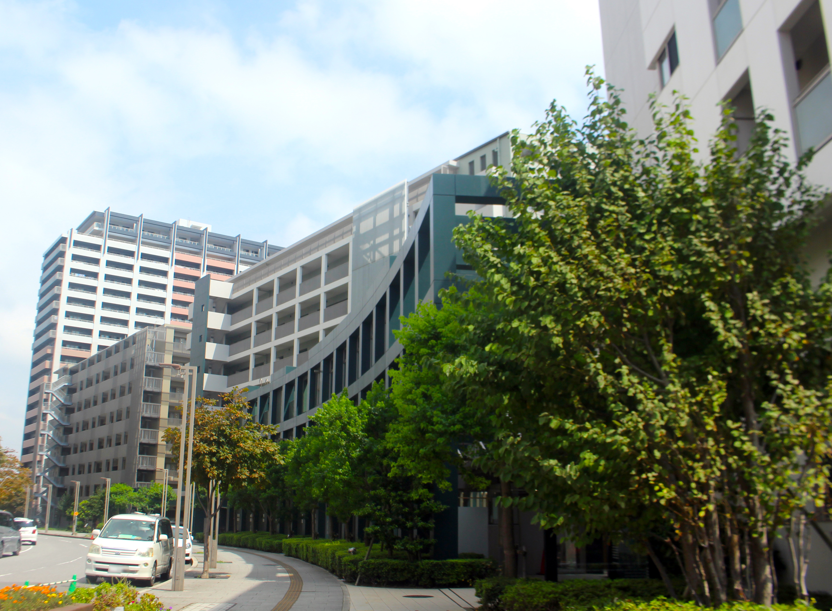 Patios Grand Exia3番館